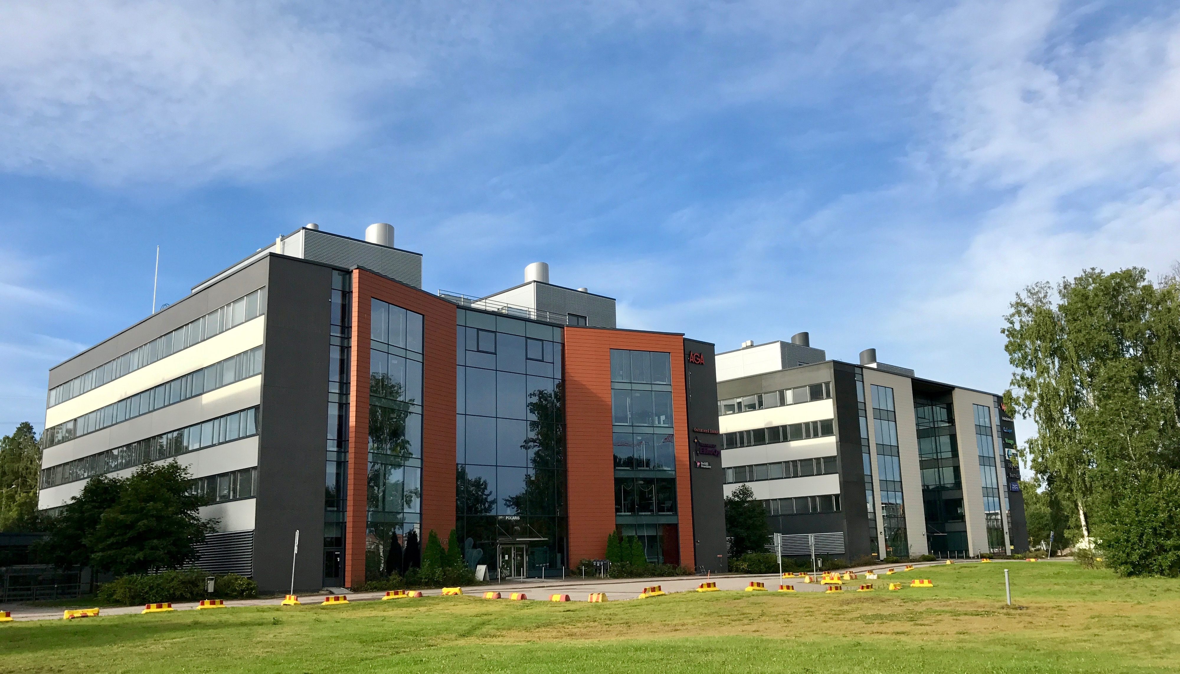 Polaris Business Parkin toimistorakennukset Vega ja Castor Espoon Leppävaarassa, osoitteessa Itsehallintokuja 6.